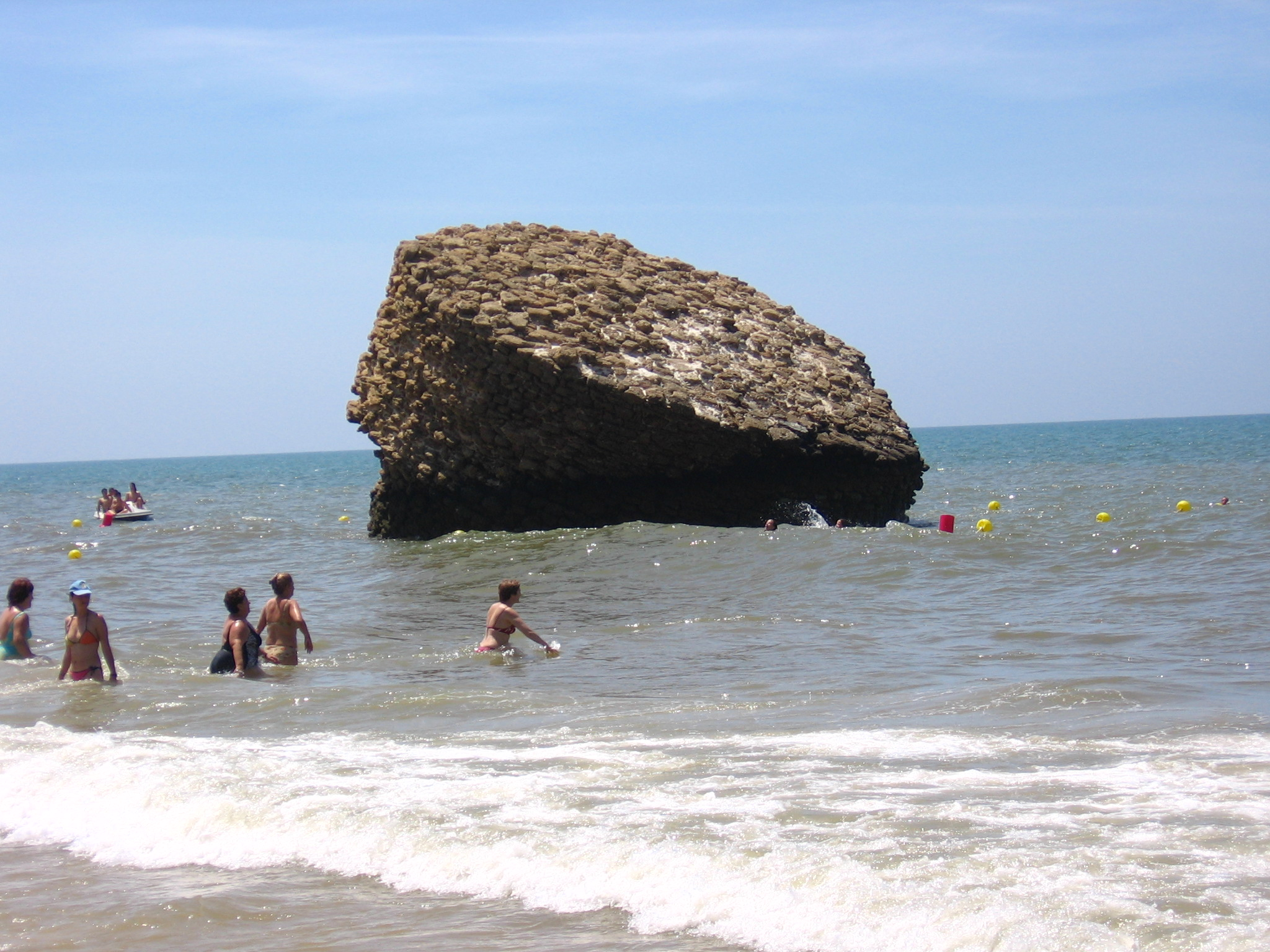 "Tapón" de Matalascañas. Es la parte inferior de un faro antiguo que ahora se asemeja en la forma a un tapón de botella. Es muy identificativo de la playa de Matalascañas.